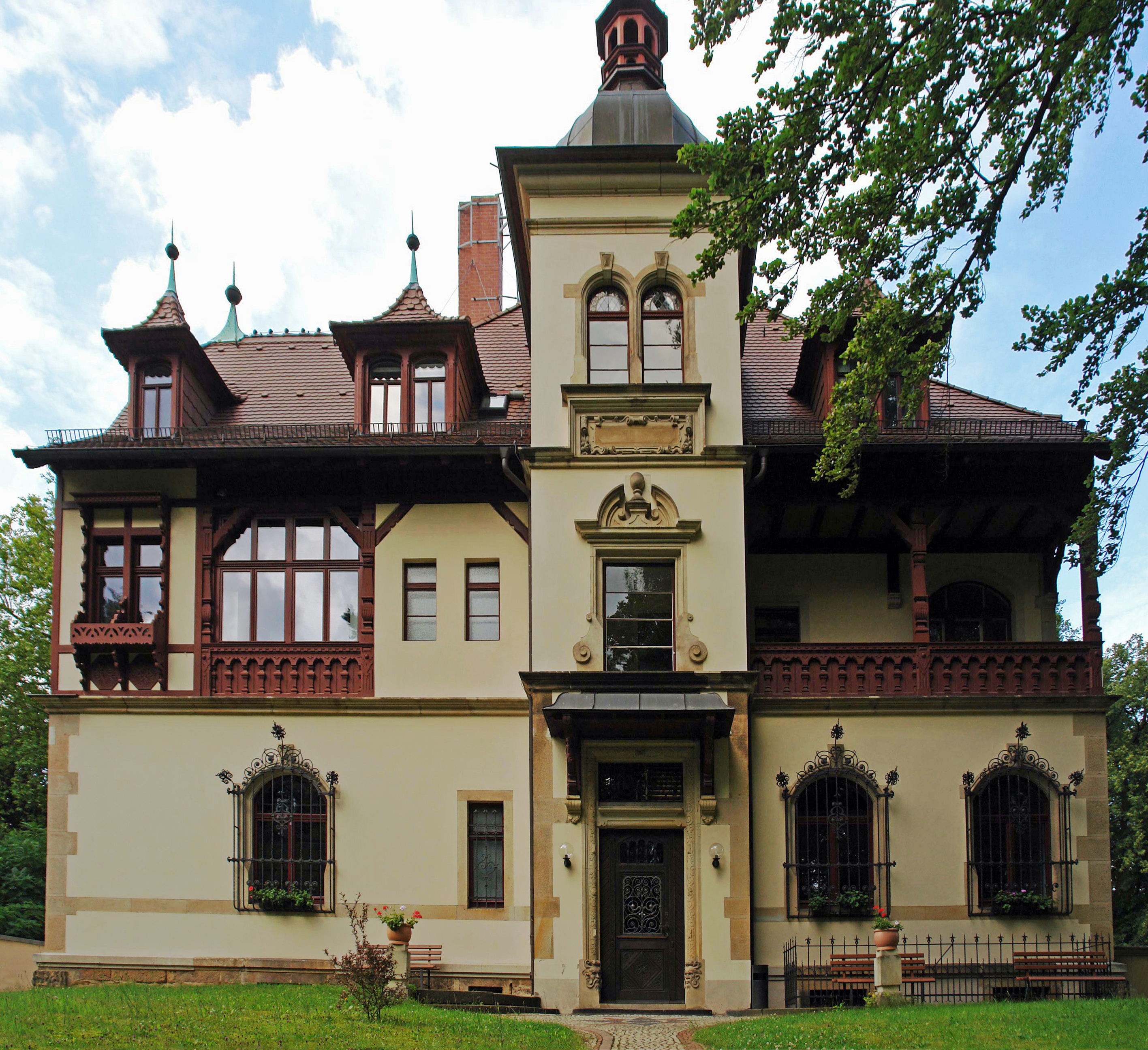 Europäisches Institut für postgraduale Bildung der TU Dresden